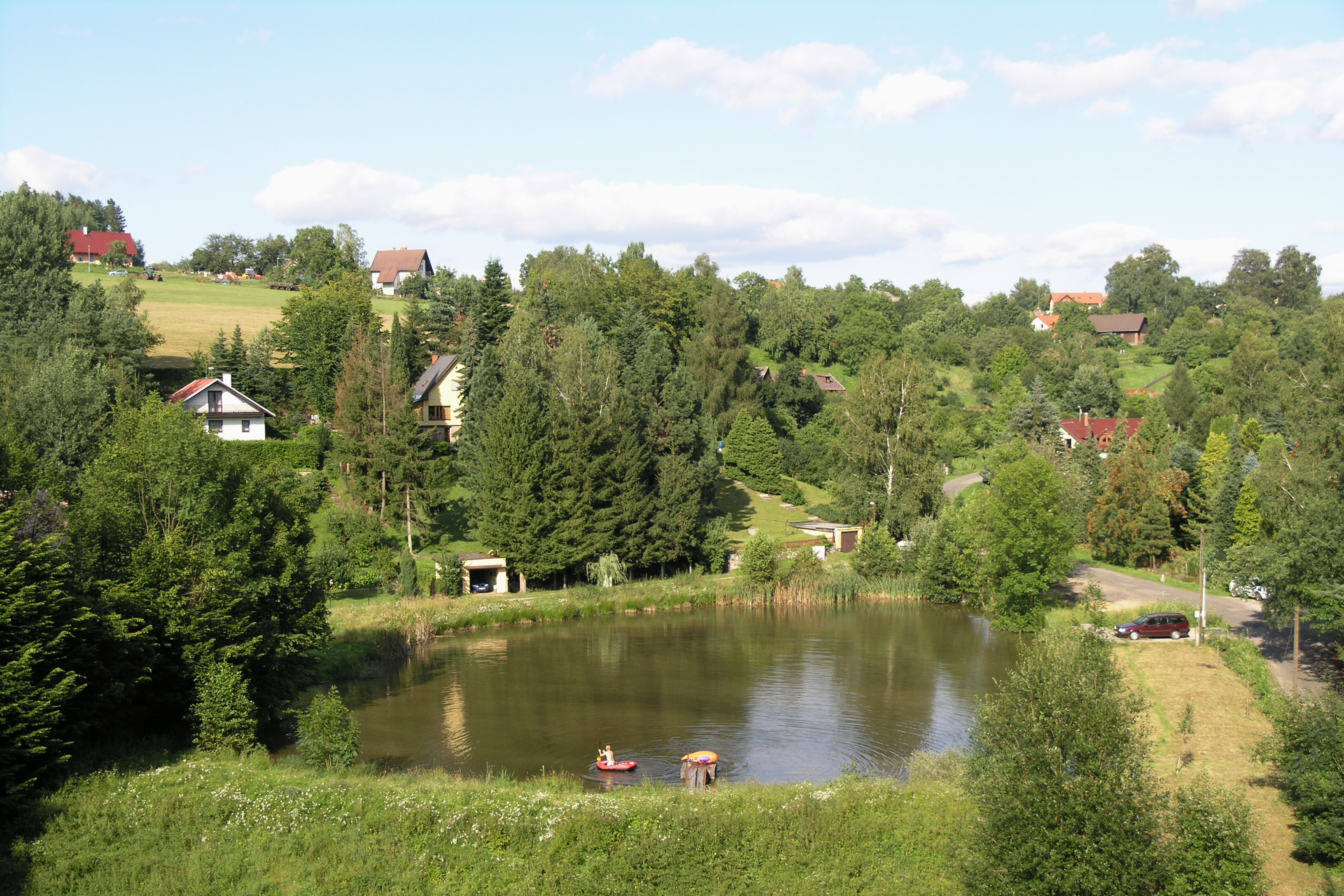 Pařezská Lhota - Pohled z hradu Pařez